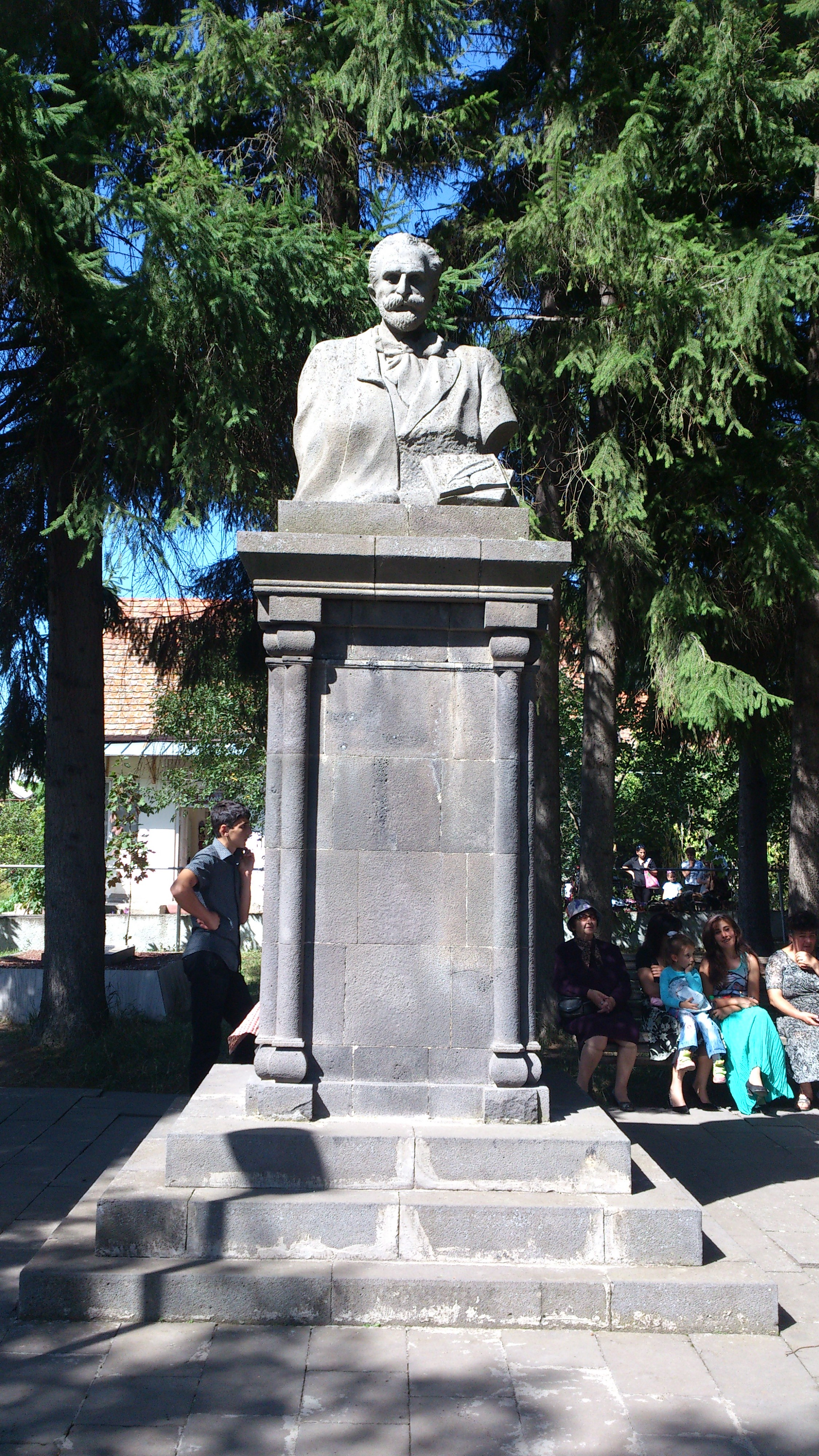 Հուշարձան Հովհաննես Թումանյանին, տուն-թանգարանի բակում, գ. Դսեղ, 1953 թ., քանդ.՝ Ա. Ուրարտու 35/41.1